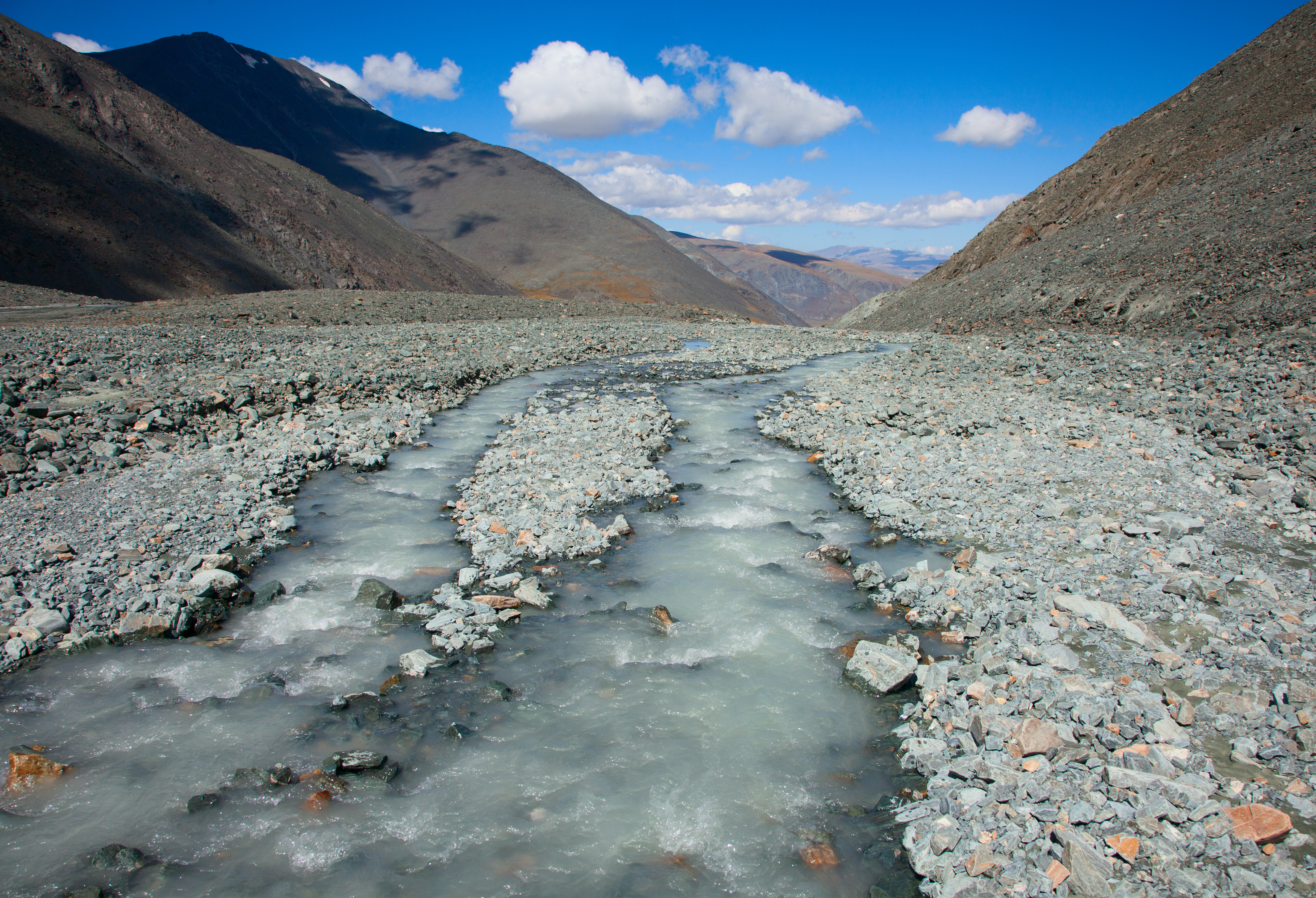 Река Турой на Алтае